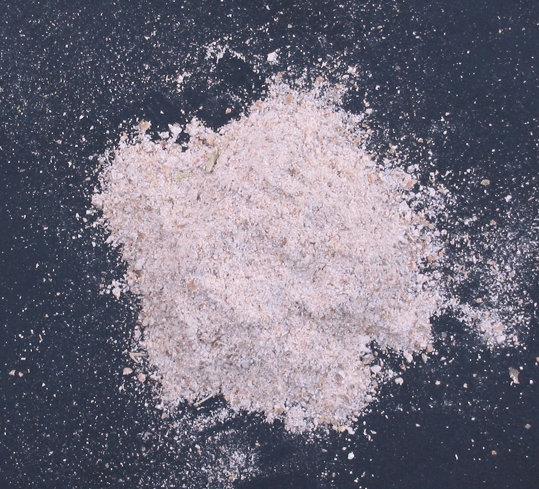 Secale cereale flour